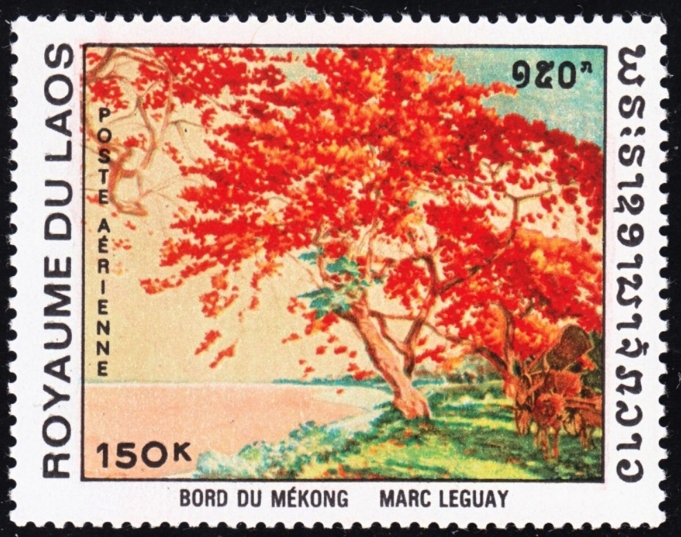 tableau de marc Leguay "arbre Flamboyant" (timbre du Laos 1970)